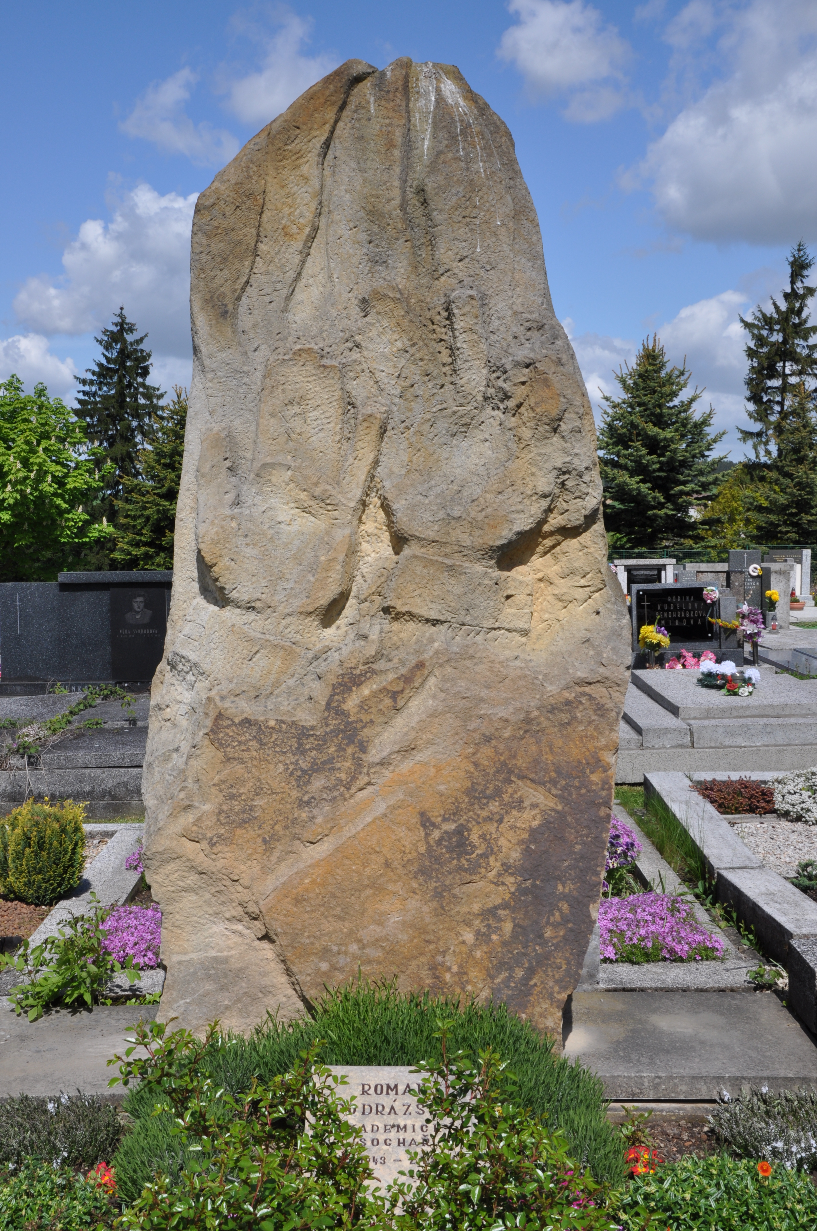 Hrob Romana Podrázského na přibyslavském hřbitově je osazen jeho dílem „Okovy“ – nedokončeným pomníkem obětem komunismu. Havlíčkova ulice. Město přibyslav. Okr. Havlíčkův Brod. Kraj Vysočina.